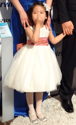 2012년형 캐리어 에어컨 신제품 발표회